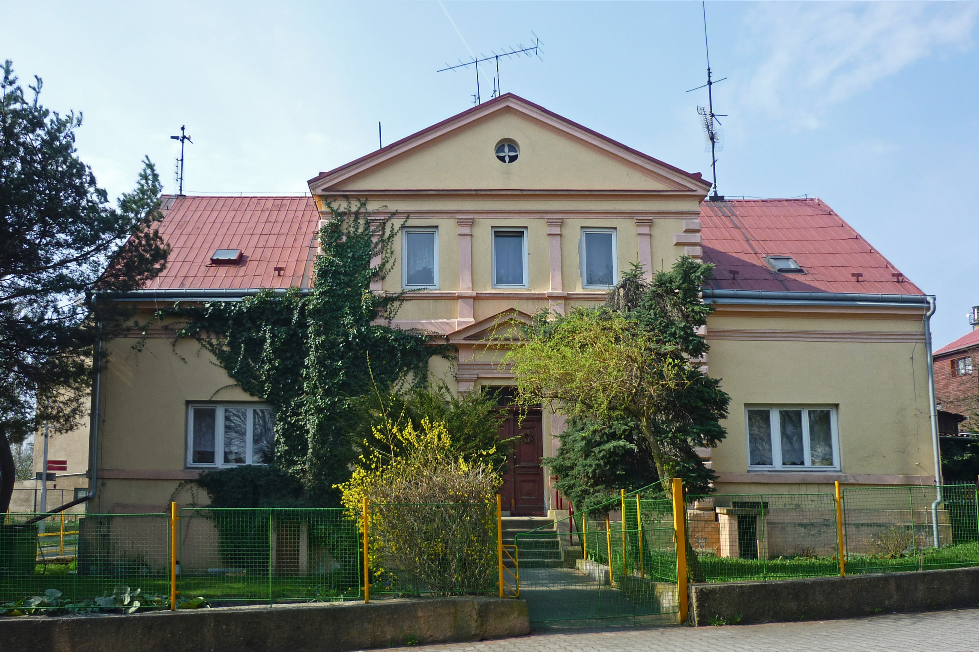 Geburtshaus von Franz Gläser (1798–1861) in Horní Jiřetín (Obergeorgenthal)